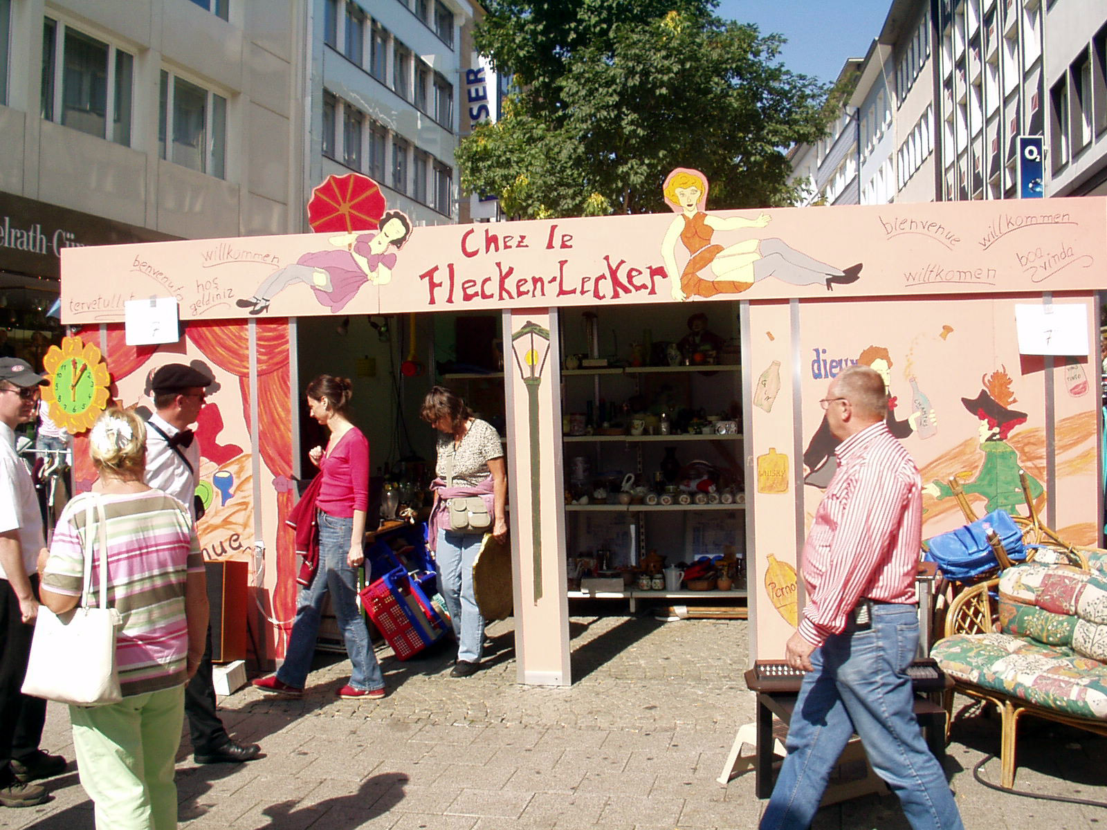 38. Zöppkesmarkt, (Trödelmarkt) in Solingen, Stand der, Untere Hauptstr.